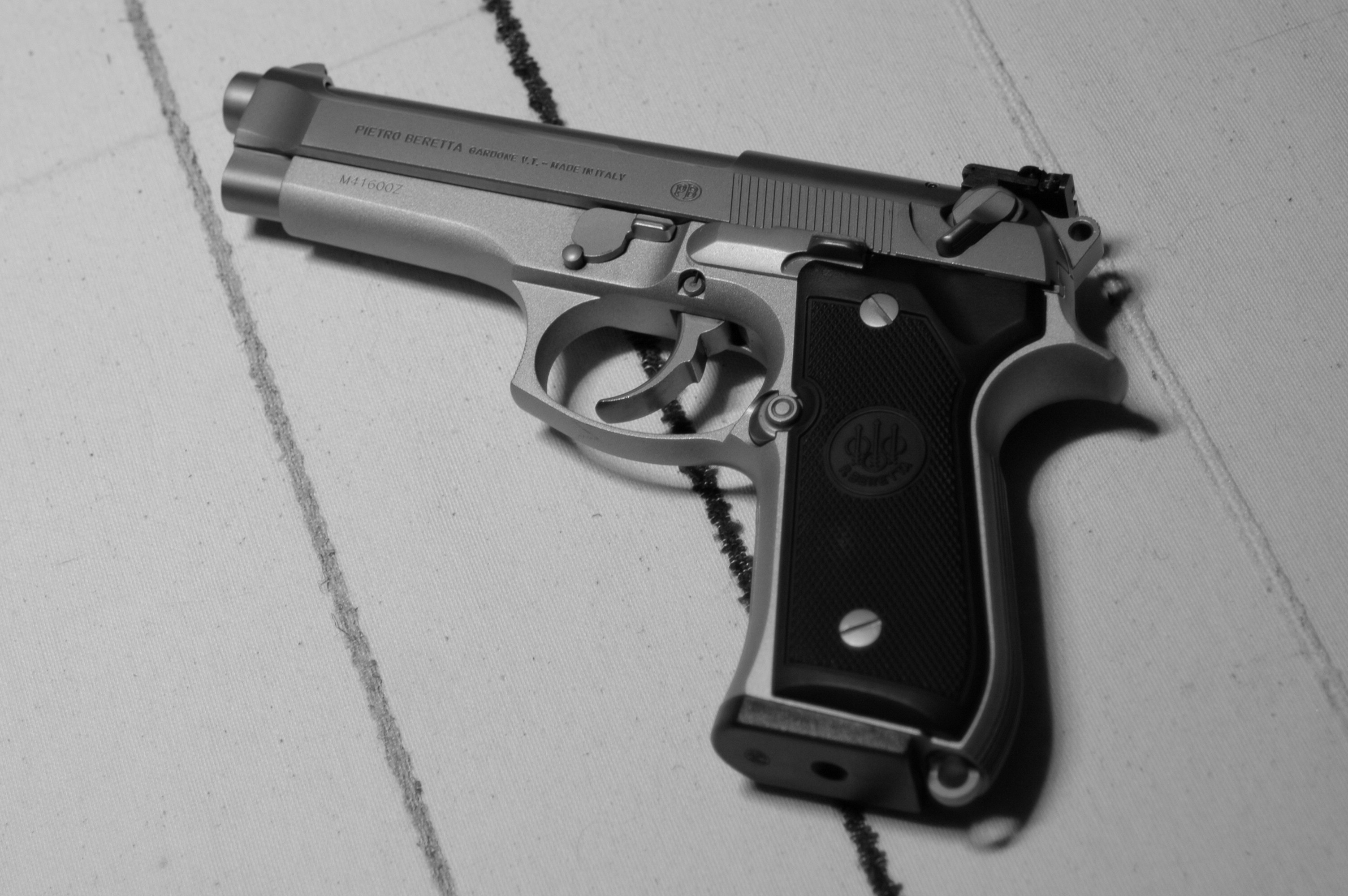 Beretta 92FSBeretta 92FS (left)